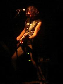 Vocalista Jaguares Concert 2007 Tampico